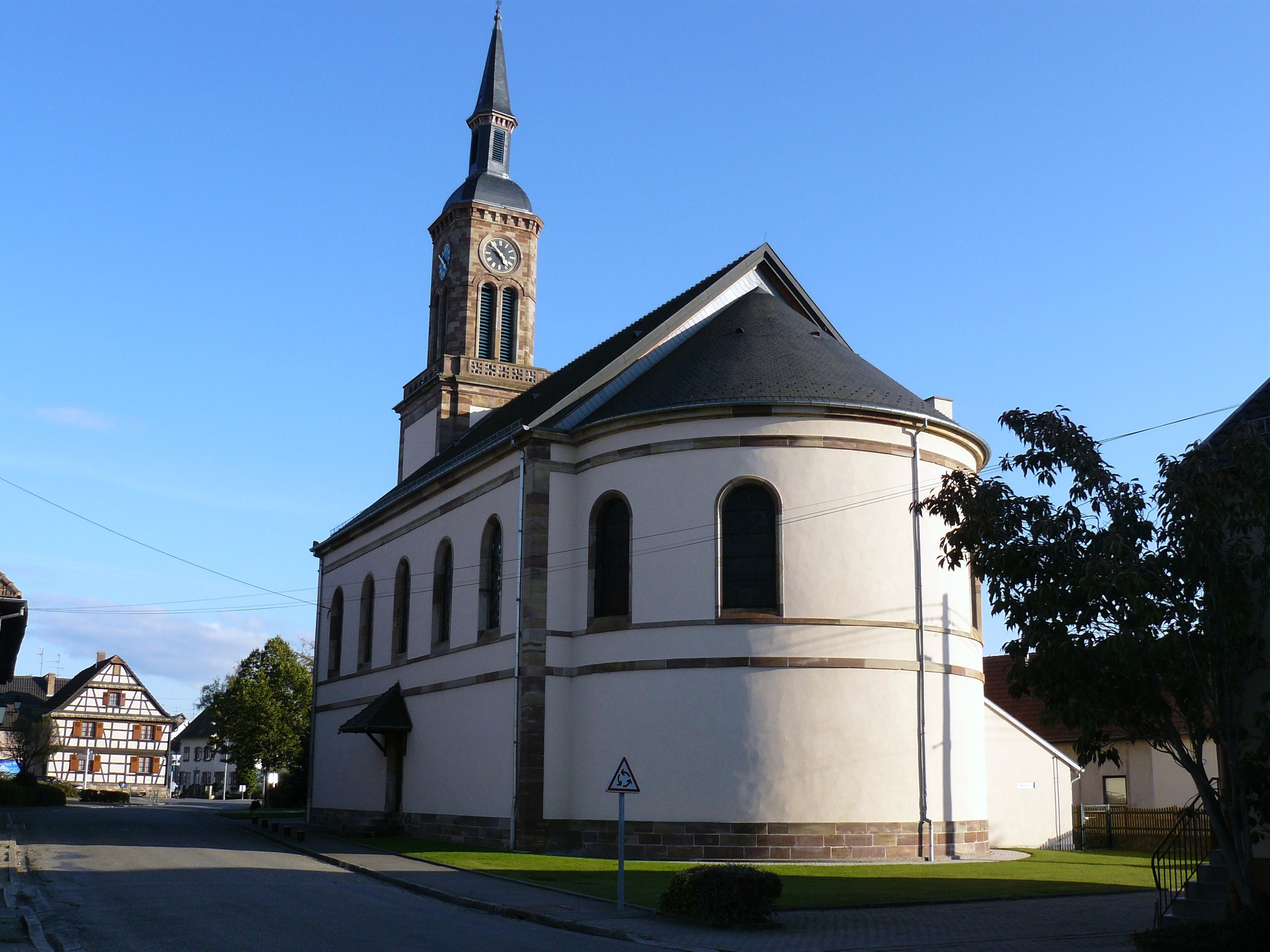 Église luthérienne (Boofzheim)